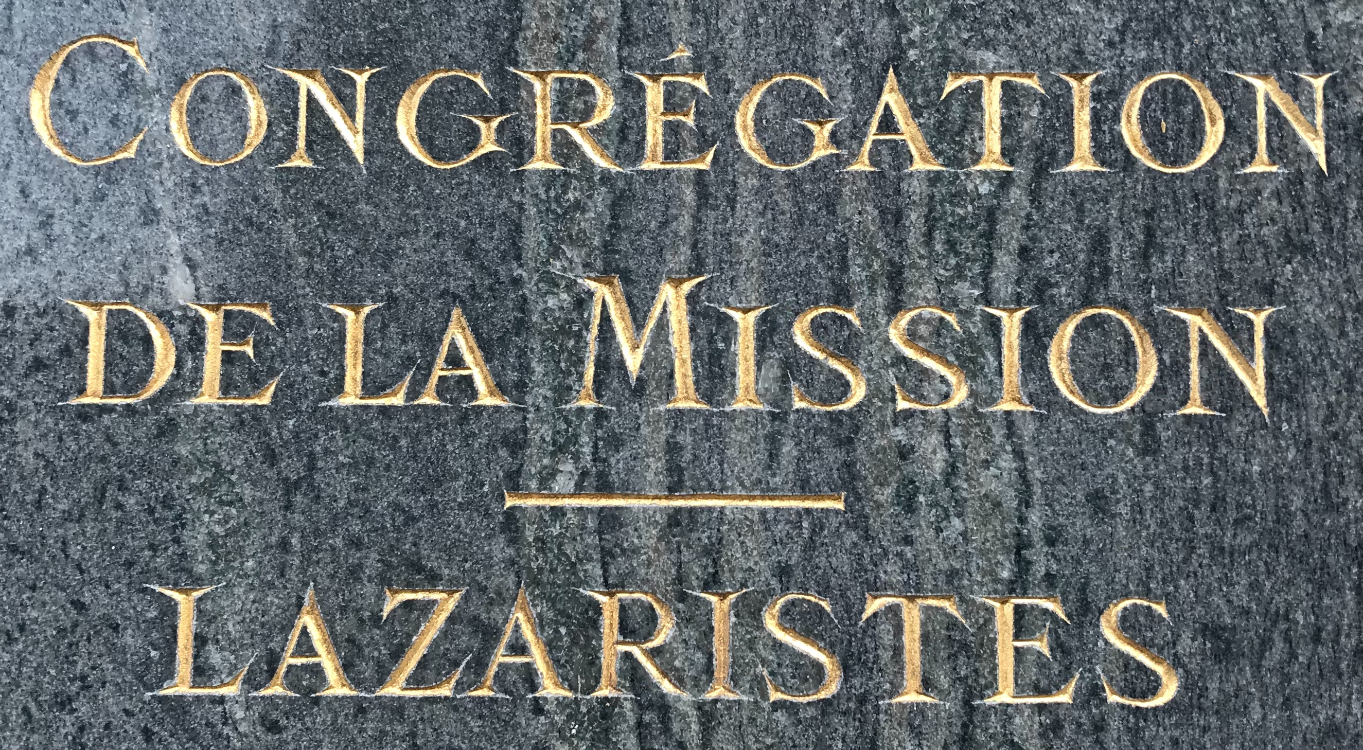 Napis na ścianie domu Zgromadzenia Misji w Paryżu